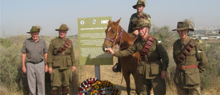 חברי עמותת הפרשים הקלים האוסטרלים בטקס חנוכת שלט-ההסבר על קרבות אל-בורג' במלחמת העולם הראשונה, בנובמבר 2012. צולם ע"י ערן תירוש מהעמותה למורשת מלחמת העולם הראשונה בישראל.